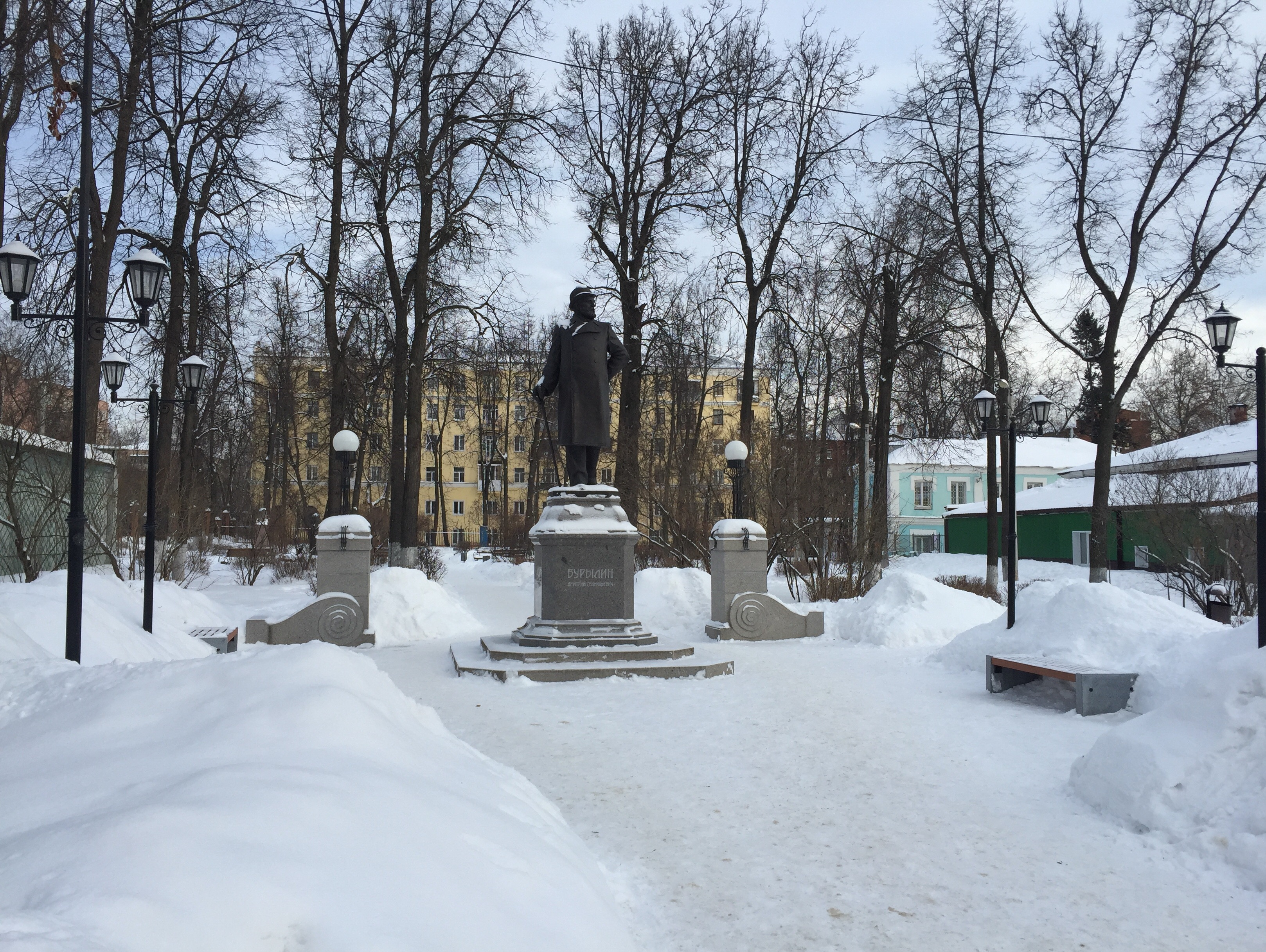 Памятник расположен неподалеку от музея и дома, в котором жил сам Бурылин и собирал свою знаменитую коллекцию. Чтобы найти надо зайти за музей ситца.